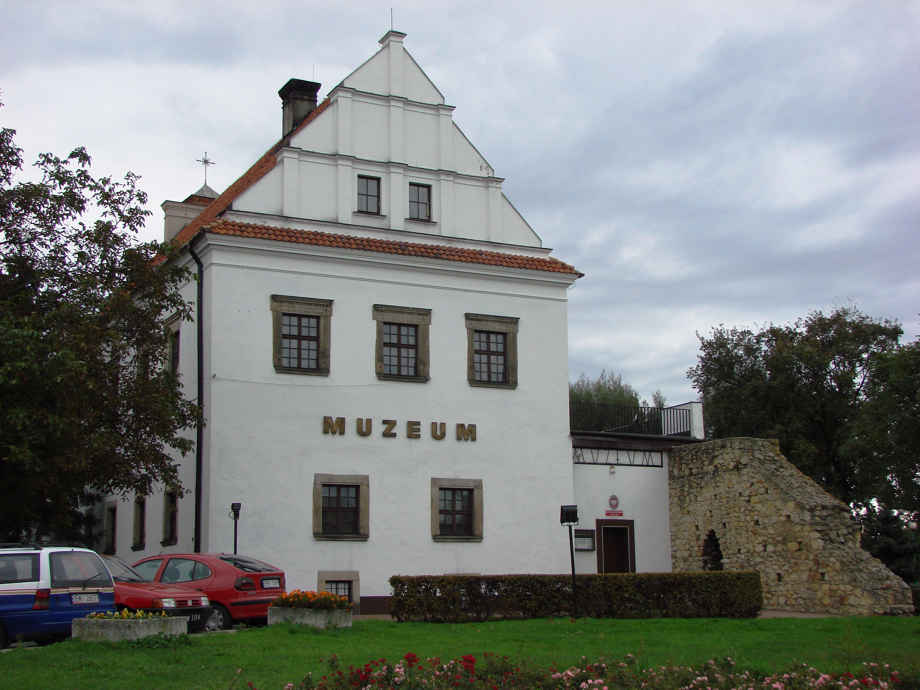 Wieluń - klasztor, ob. Muzeum Ziemi Wieluńskiej, w zespole klasztornym bernardynek (zabytek nr rejestr. 182/970)